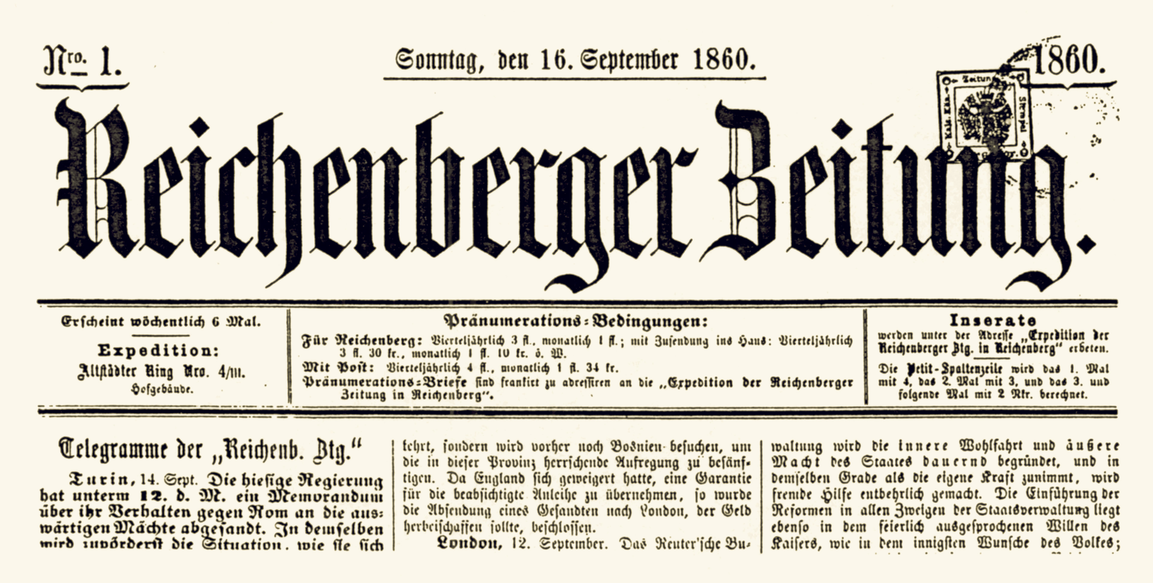 Erste Ausgabe der Reichenberger Zeitung vom 16. September 1860. Das Original ist erhalten geblieben und in der Reichenberger Heimatstube in der Patenstadt Augsburg ausgestellt.